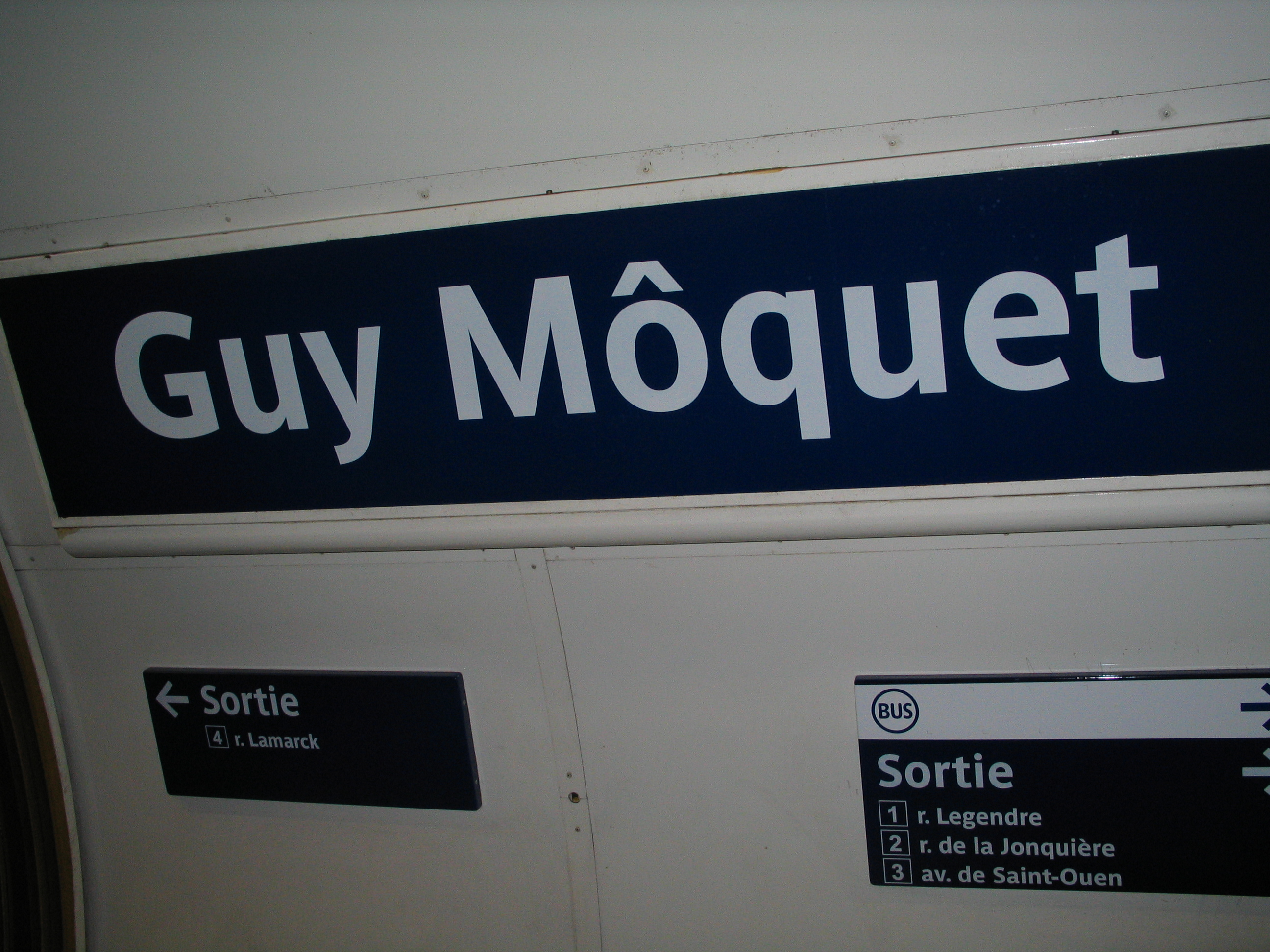 Exposition métro Guy Môquet, Paris